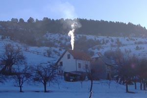 Аутор - Раде Грујичић